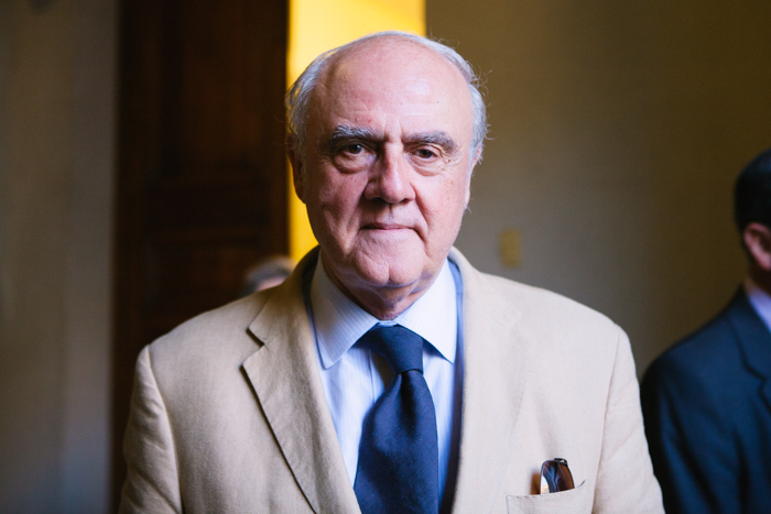 Agustín Squella, abogado chileno.